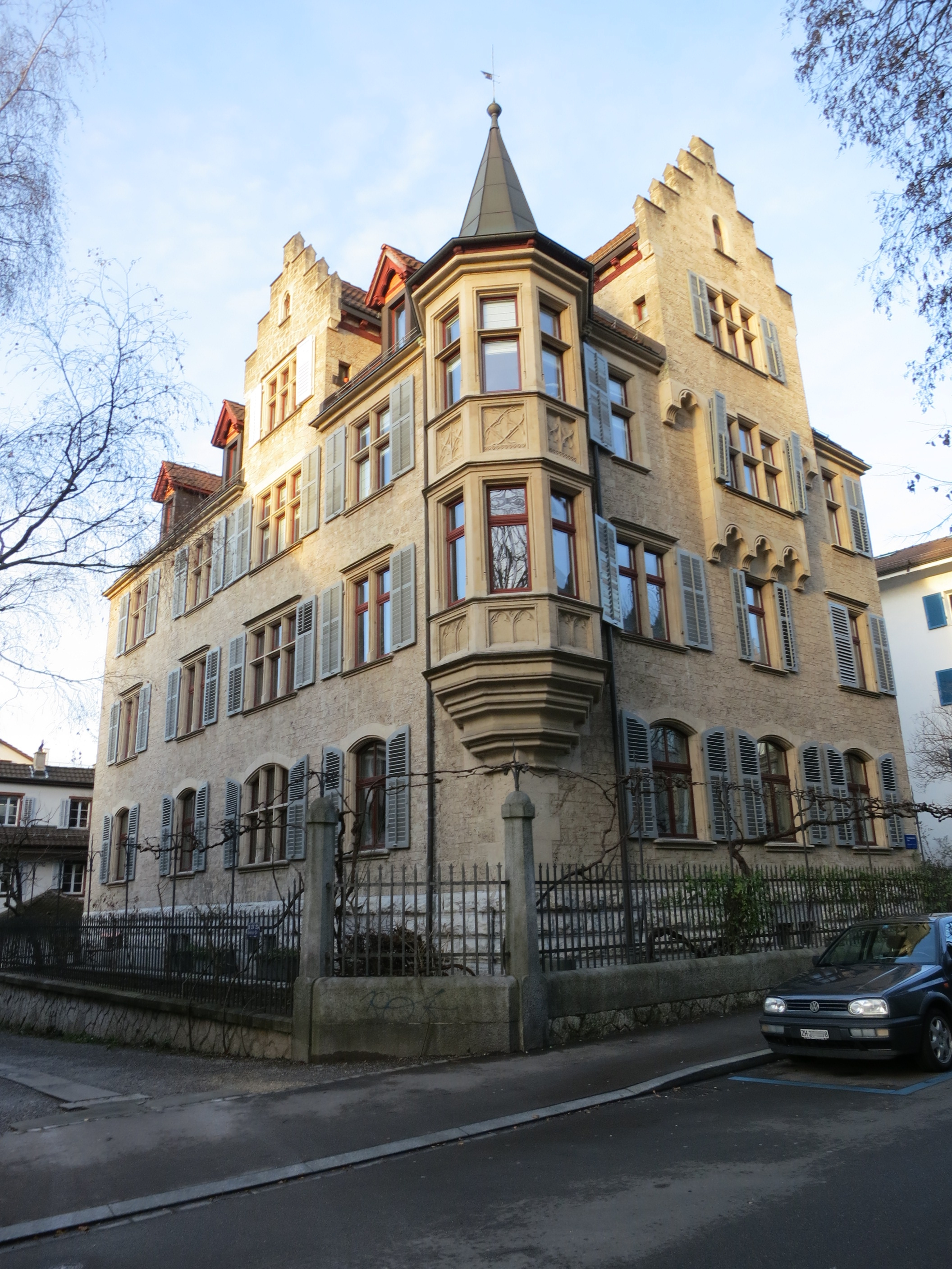 C.G. Jung Institut, Zürich-Hottingen, Schweiz